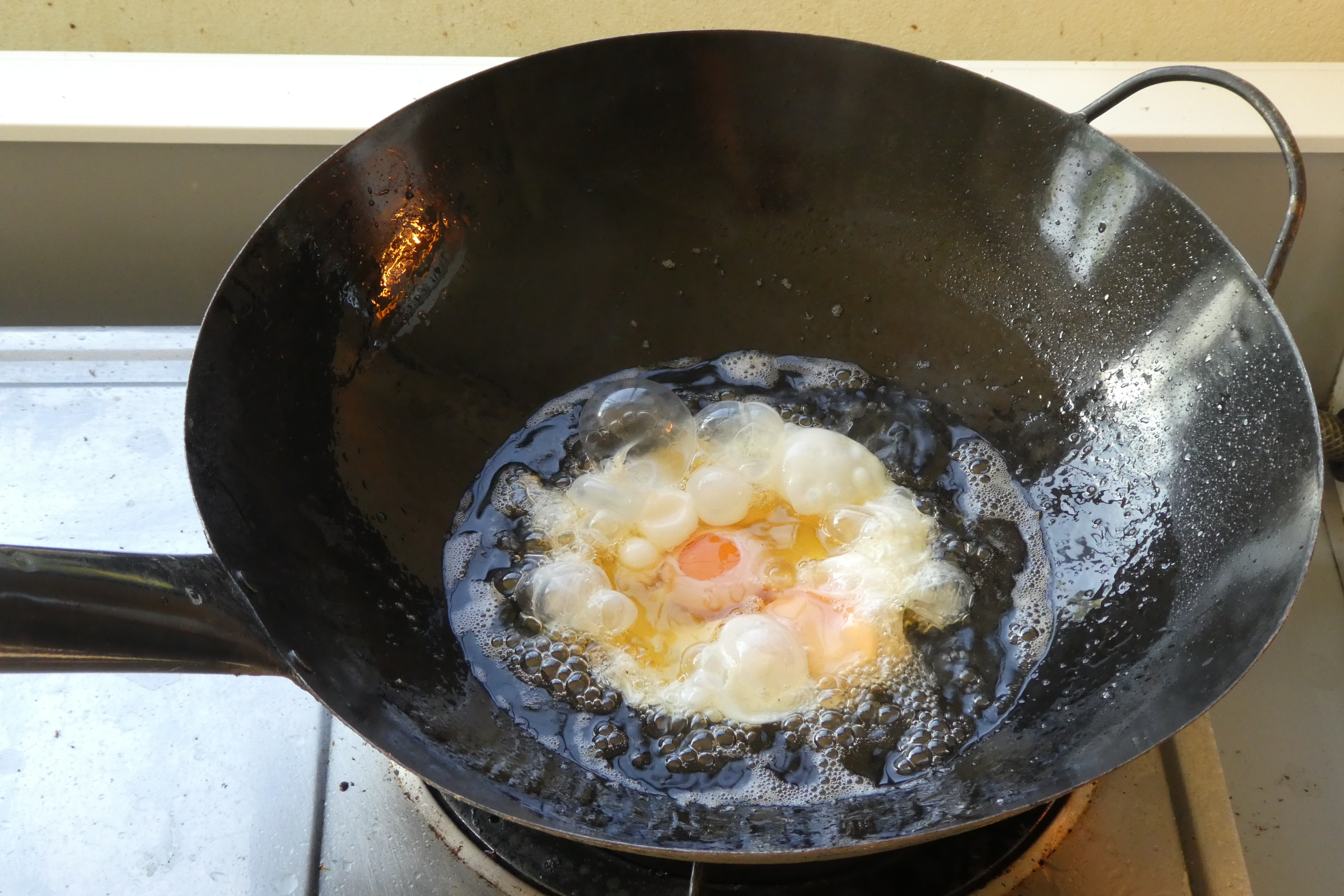 Fried eggs